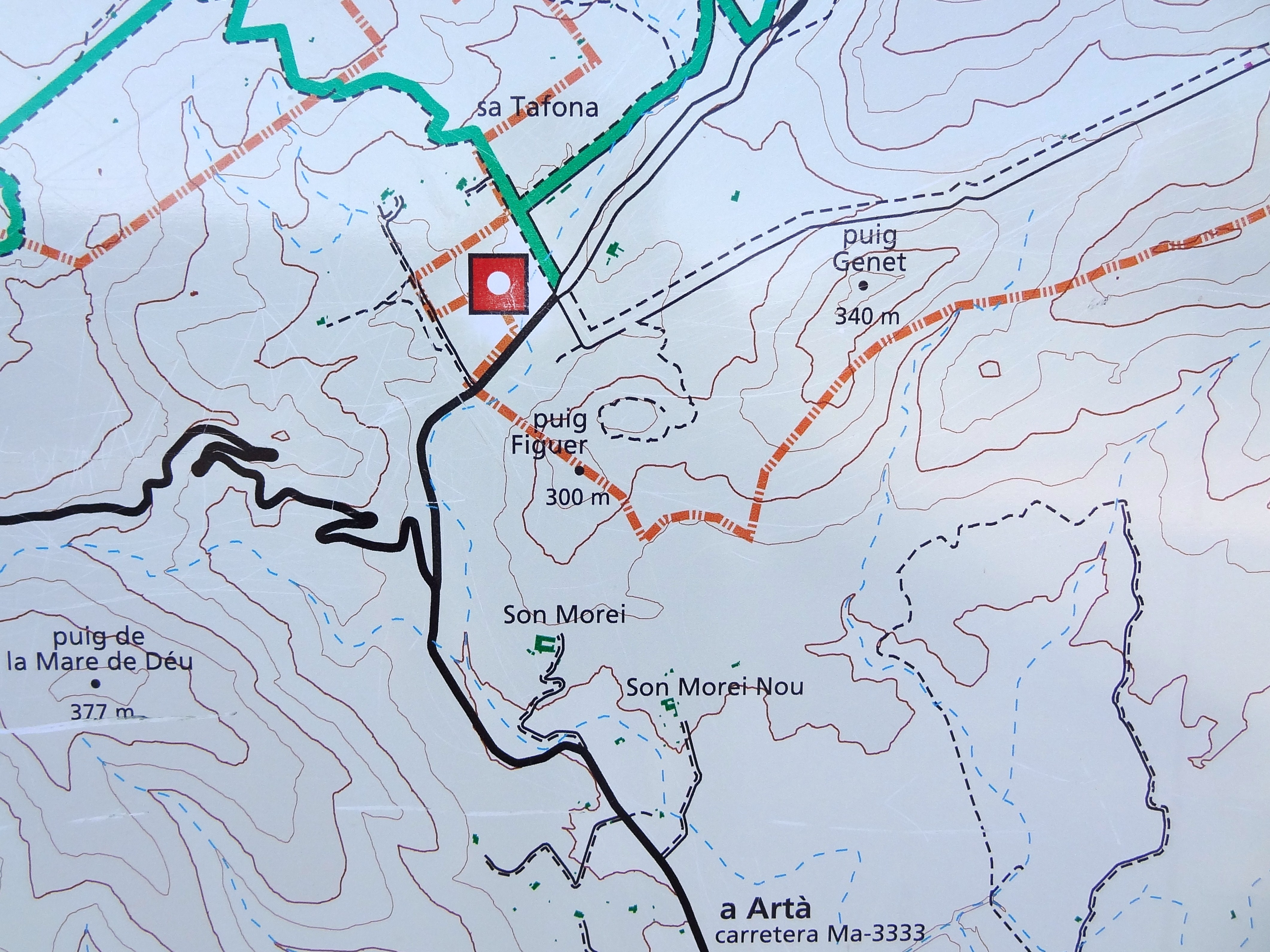 Karte auf einer Informationstafel am Parkplatz von s’Alqueria Vella de Baix, Gemeinde Artà, Mallorca, Spanien